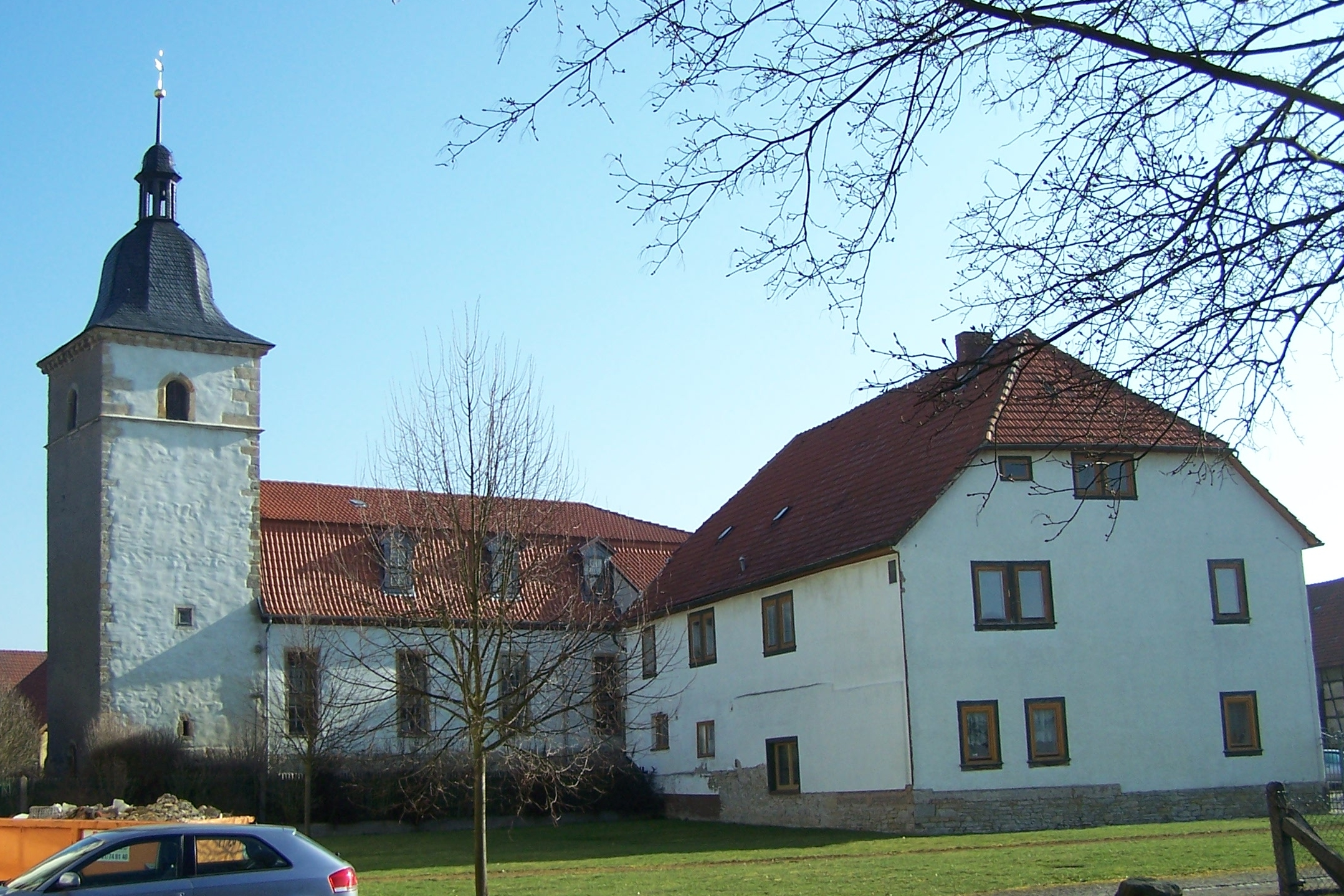 Ansichten und Details zum Ort Tungeda im Wartburgkreis.